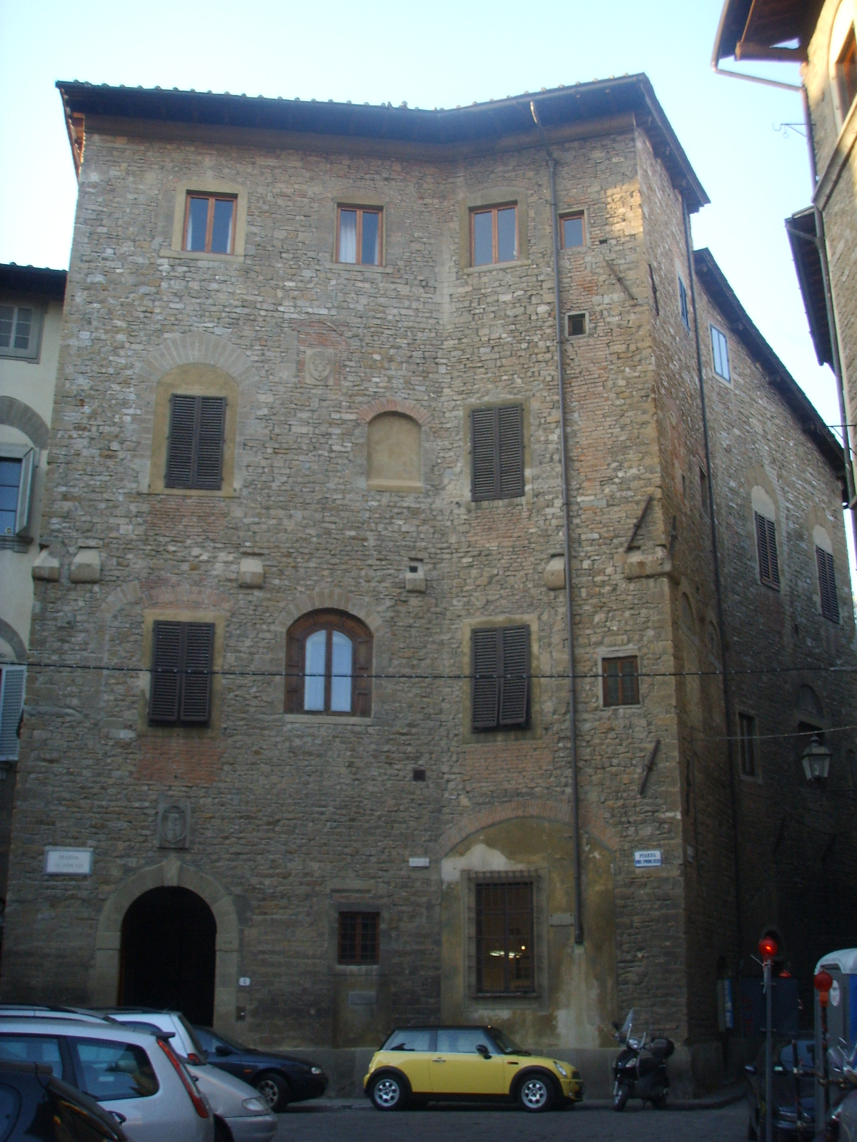 Torre degli Peruzzi in Florence, Italy